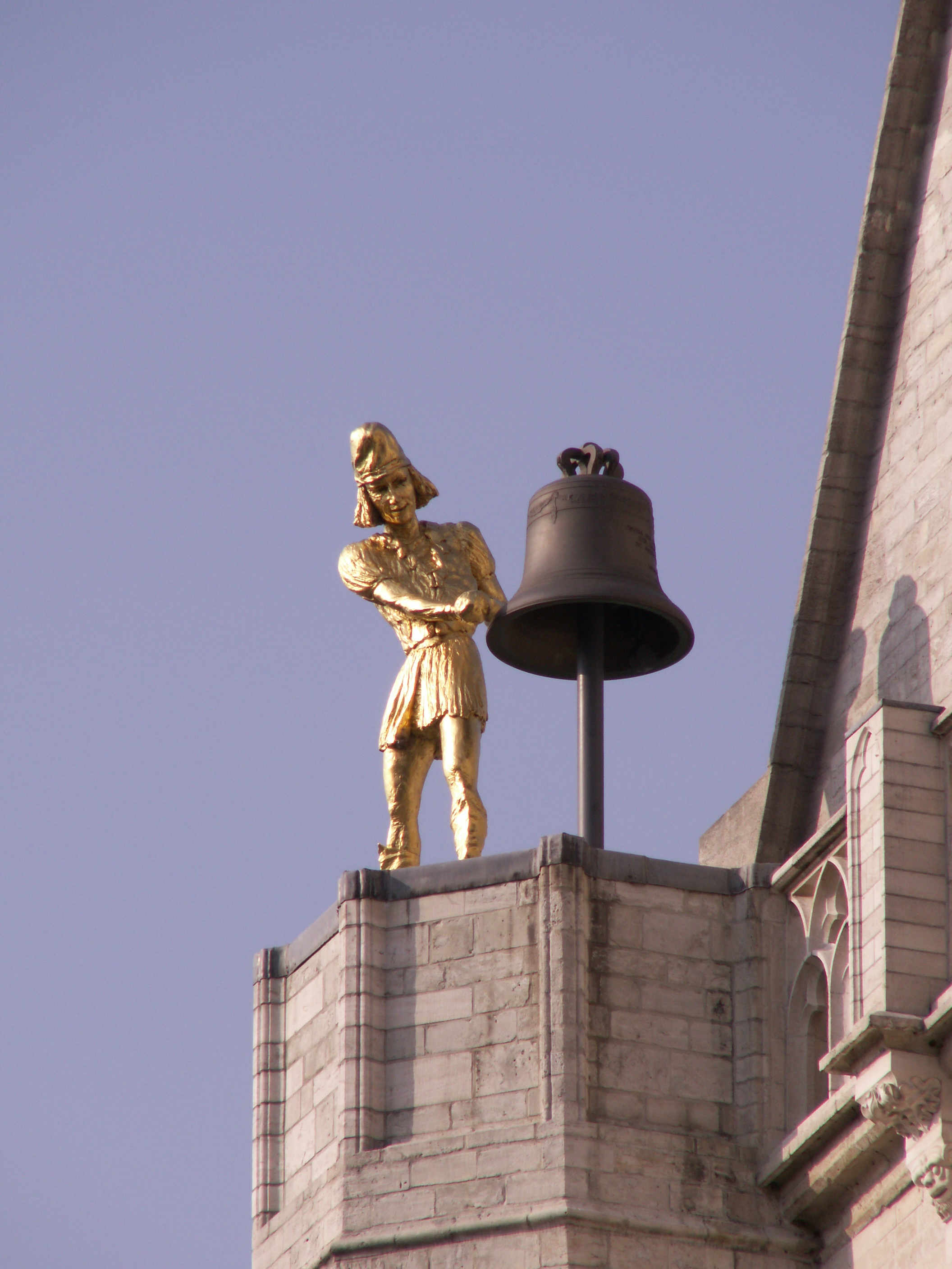 Jacquemart de la Collégiale Saint Pierre à Louvain (Belgique) Cliché personnel (18.03.2006)